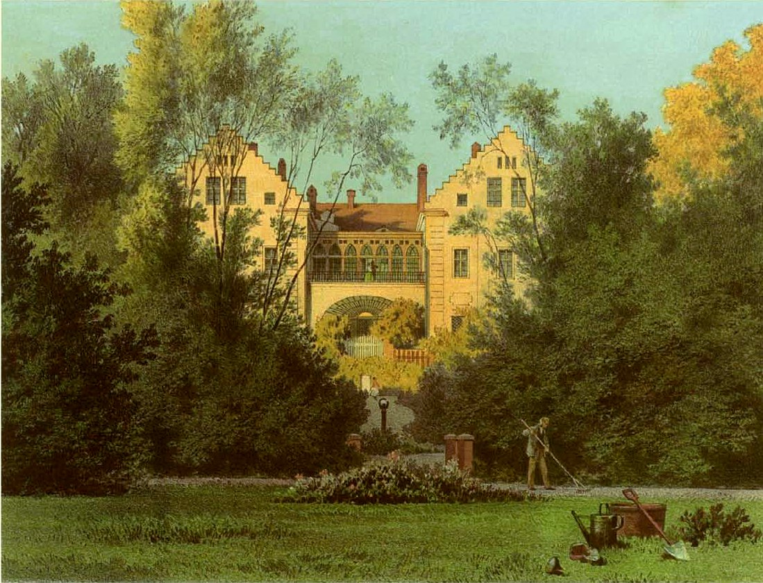 Rittergut Kuttlau, Kreis Glogau, Provinz Schlesien